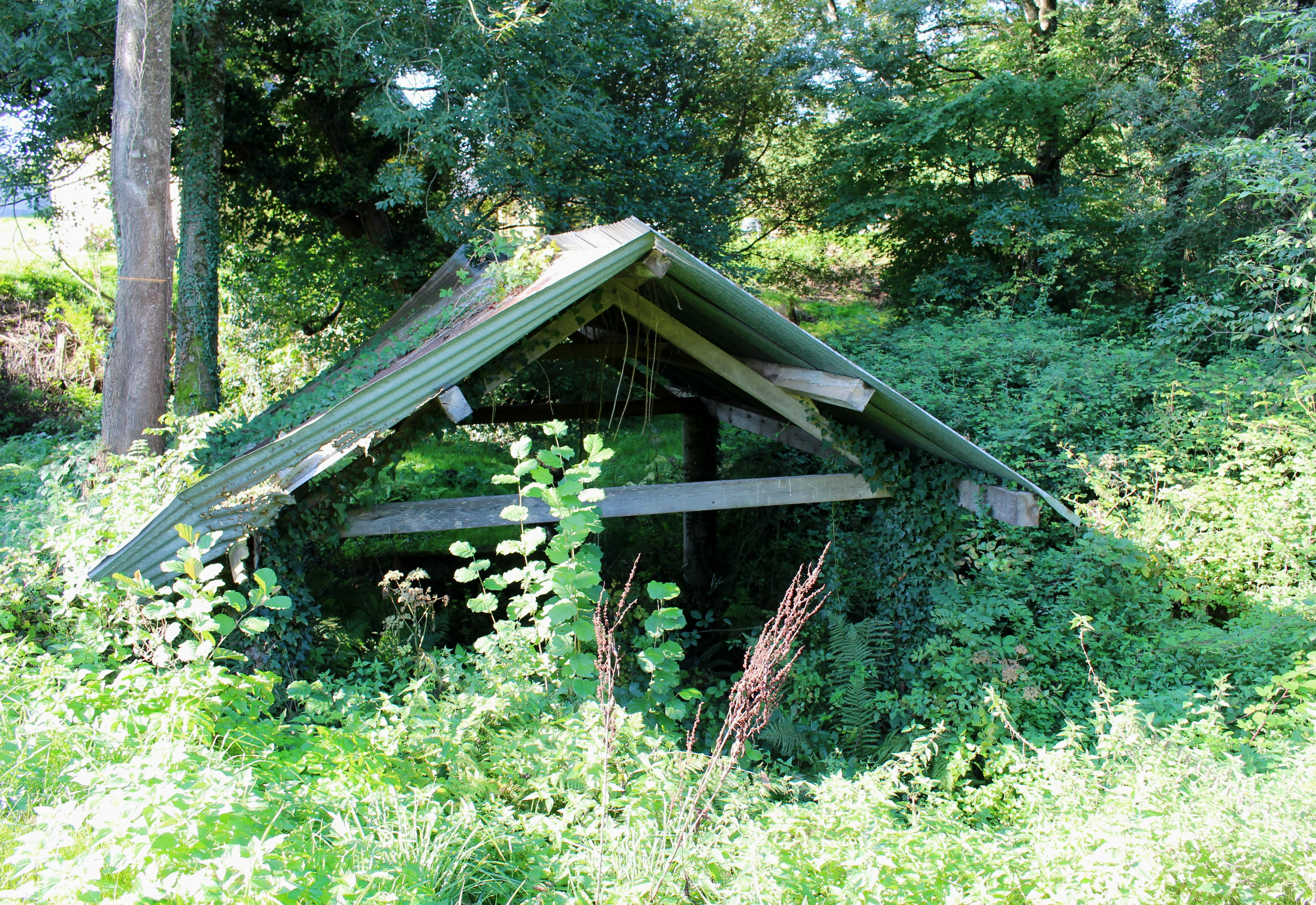 Lavoir de Loucrup (Hautes-Pyrénées)